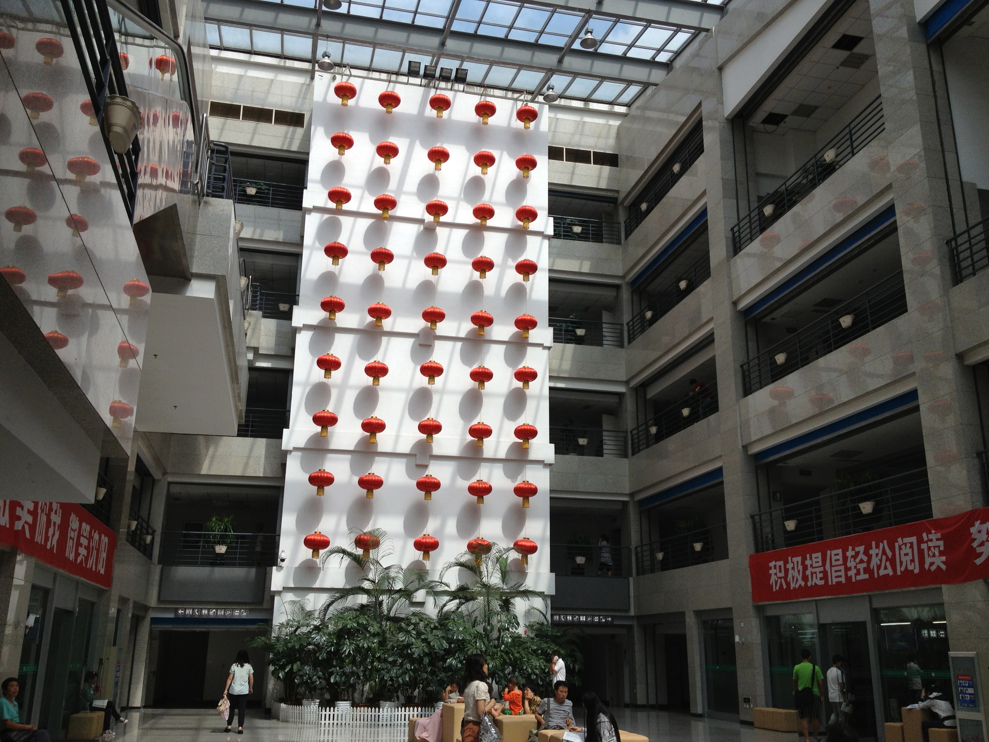 中文（中国大陆）: 沈阳市图书馆内景